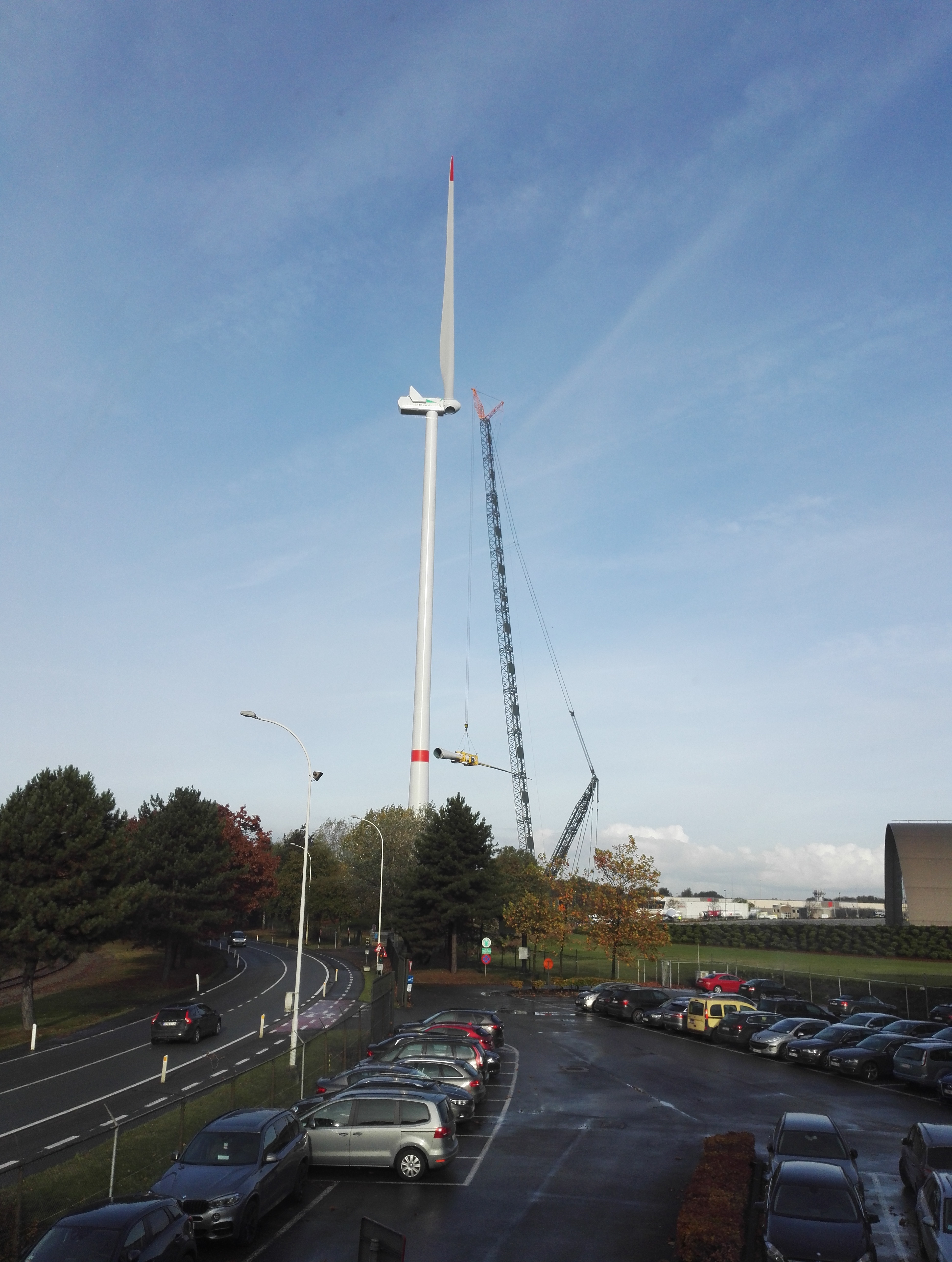 Opbouw windmolen te ArcelorMittal Gent